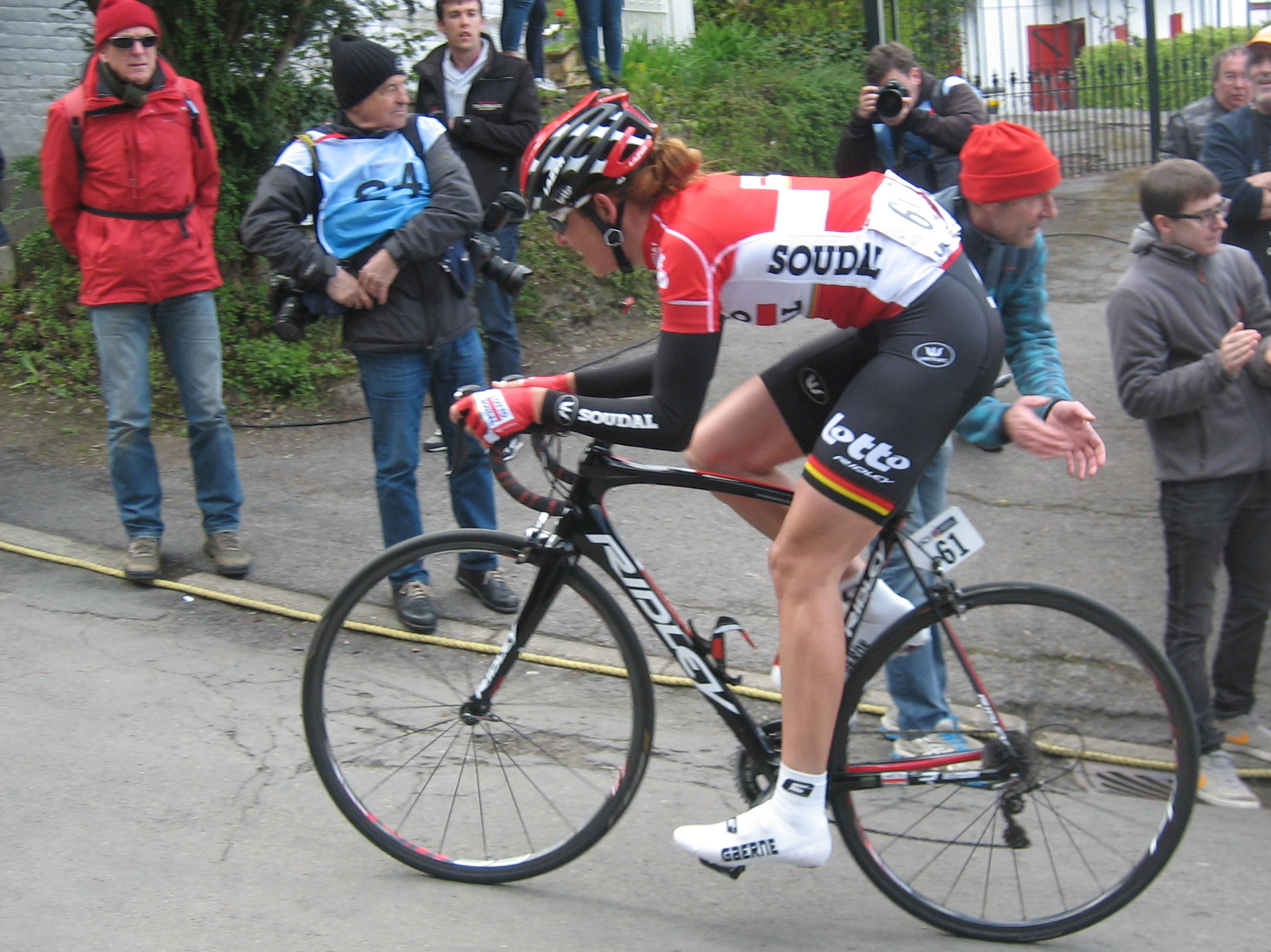 Isabelle Beckers (Lotto Soudal Ladies) in de Waalse Pijl 2017